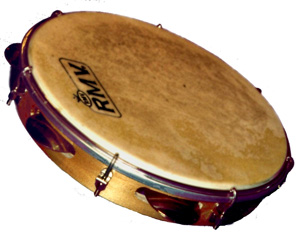 pandeiro new 30/09/07.jpg